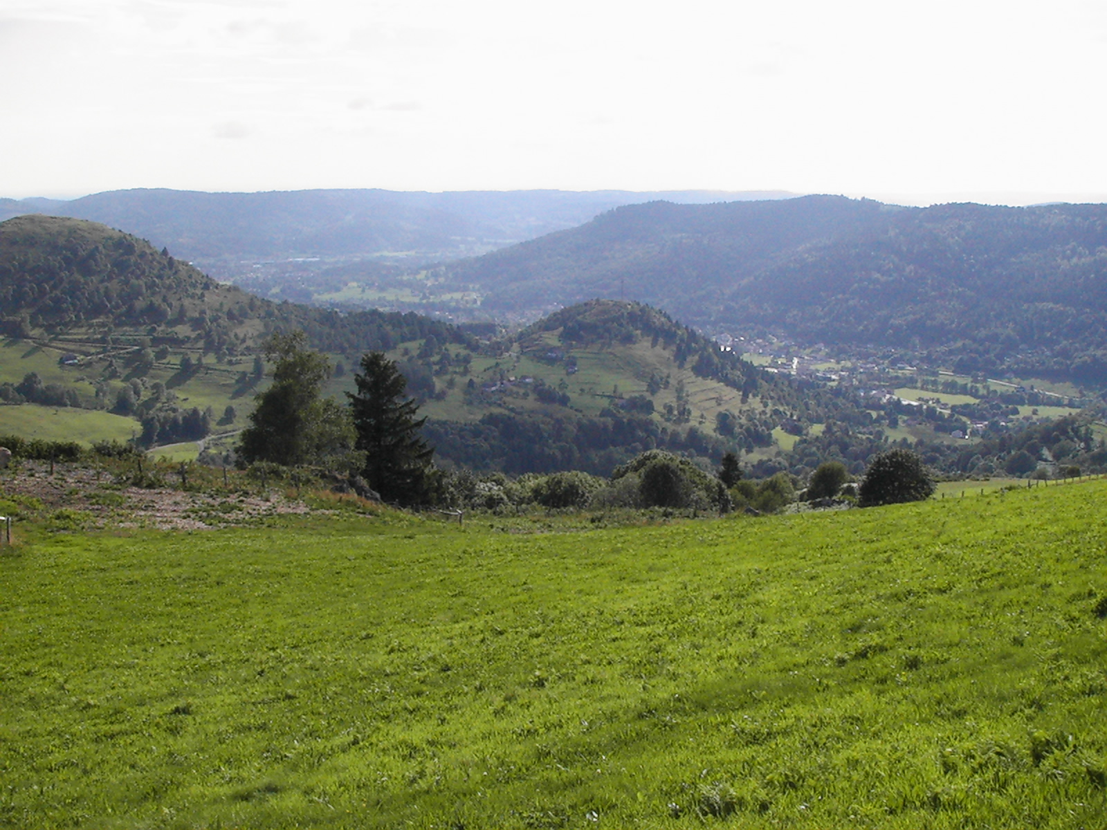 Vue sur le village du Ménil (Vosges, France) depuis la tête des Champs.